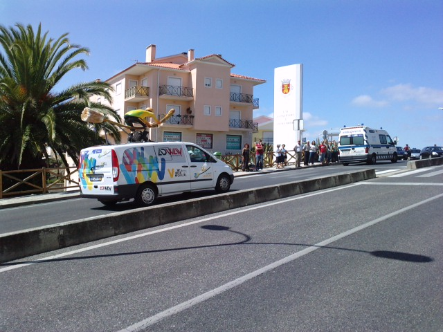 Carro-vassoura da Volta a Portugal de 2012 a passar no Lugar da Paz, 26/08/2012